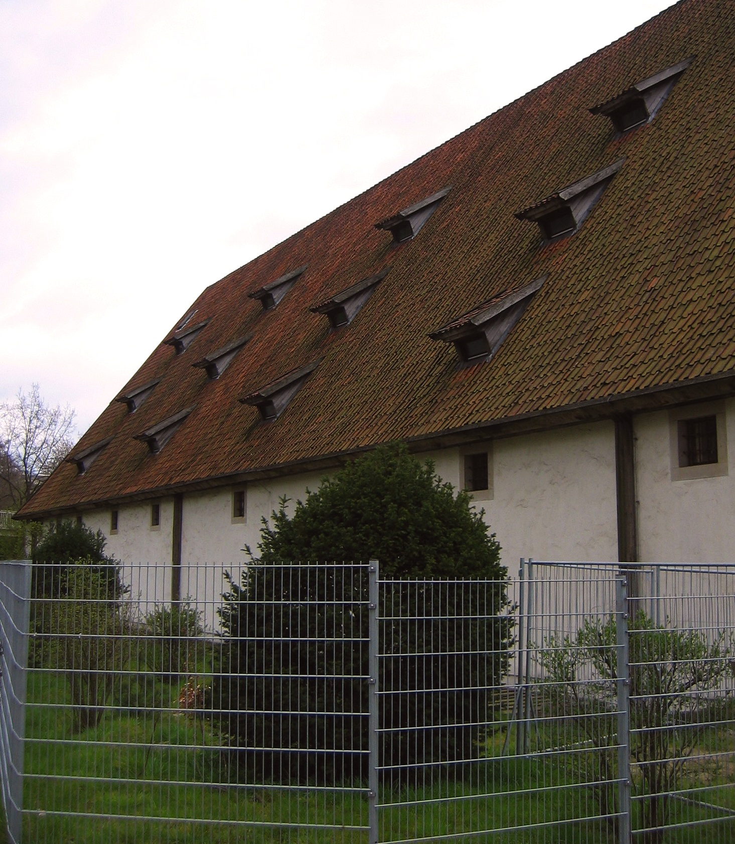 Museumsdorf Cloppenburg, Ausstellungshalle „Münchhausen-Scheune“